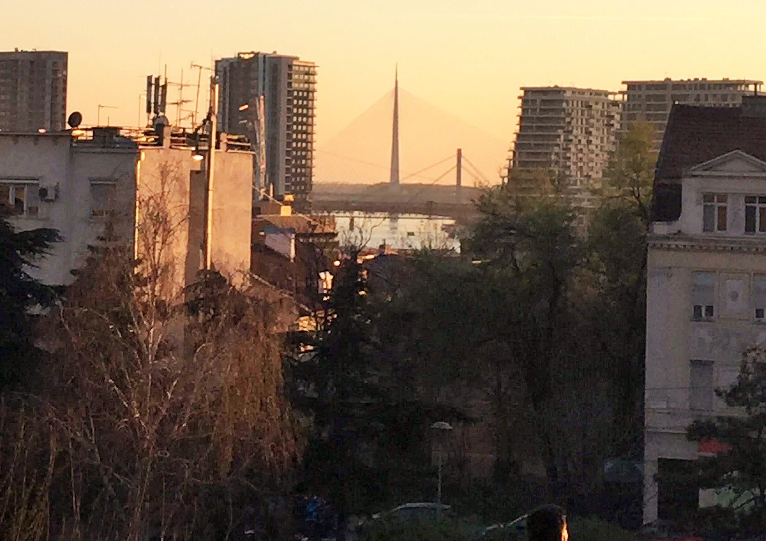 Terazijska terasa, Beograd, Srbija